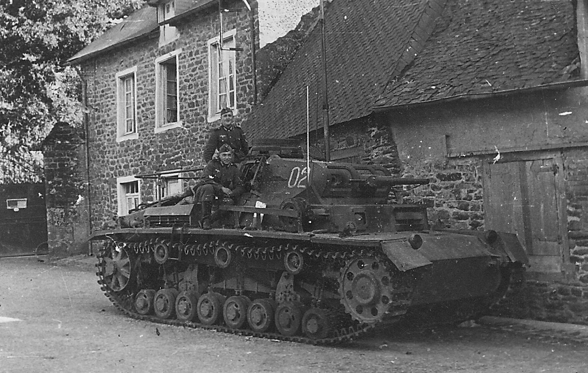 Panzerbefehlswagen III Ausf. D in Frankreich, ca. 1940